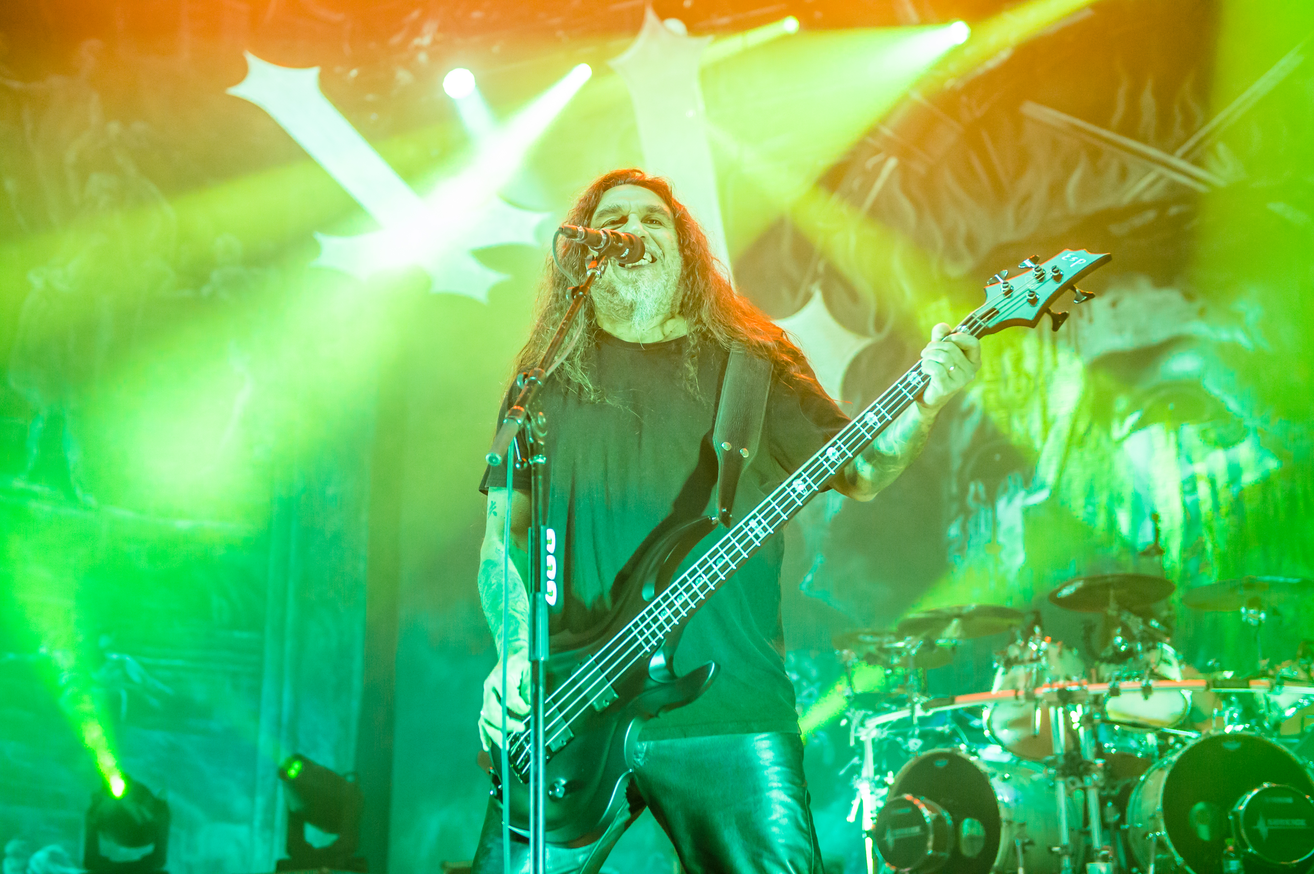 'Slayer Tour 2015 Bochum'